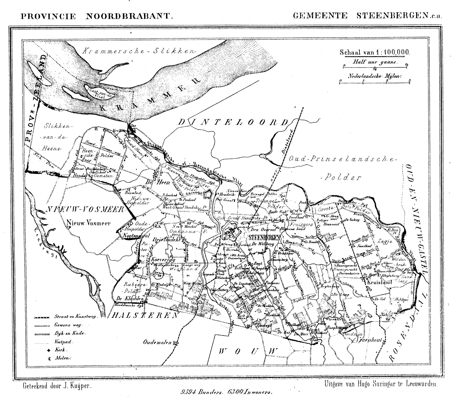 Nederland, Noord-Brabant, Gemeente Steenbergen